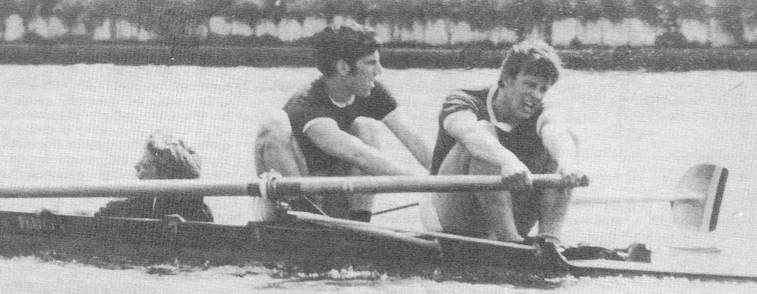 Telamon 2+ met de beruchte "Telamonschoppen"